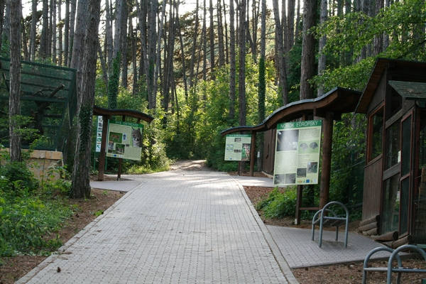 ZOO Bojnice - Karpatský náučný chodník s expozíciami pre vlkov, rysa ostrovida, norka európskeho a mačku divú.